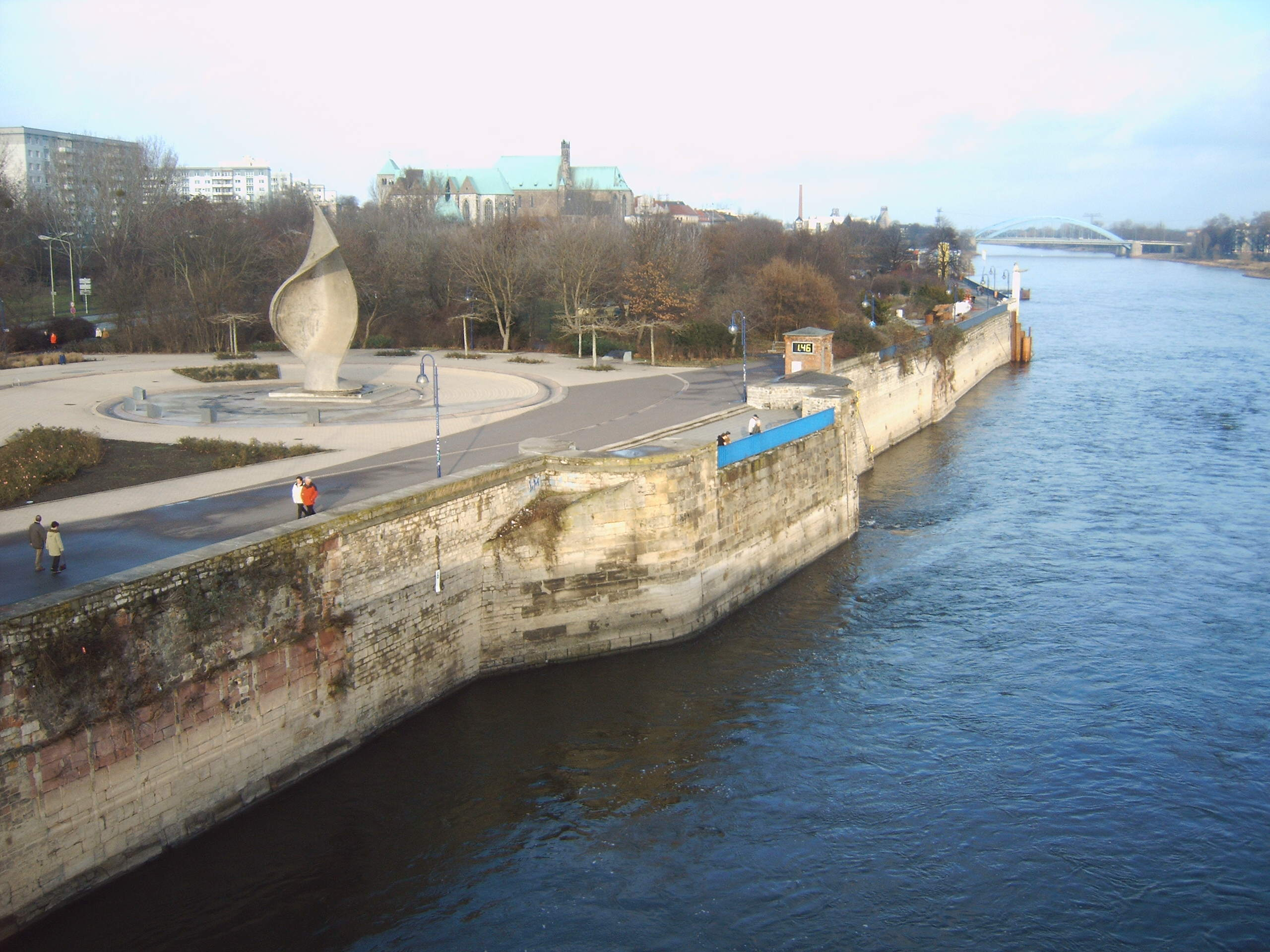 westliches Elbufer in Magdeburg, Schleinufer, ehemaliges Gelände des Neuen Brücktores